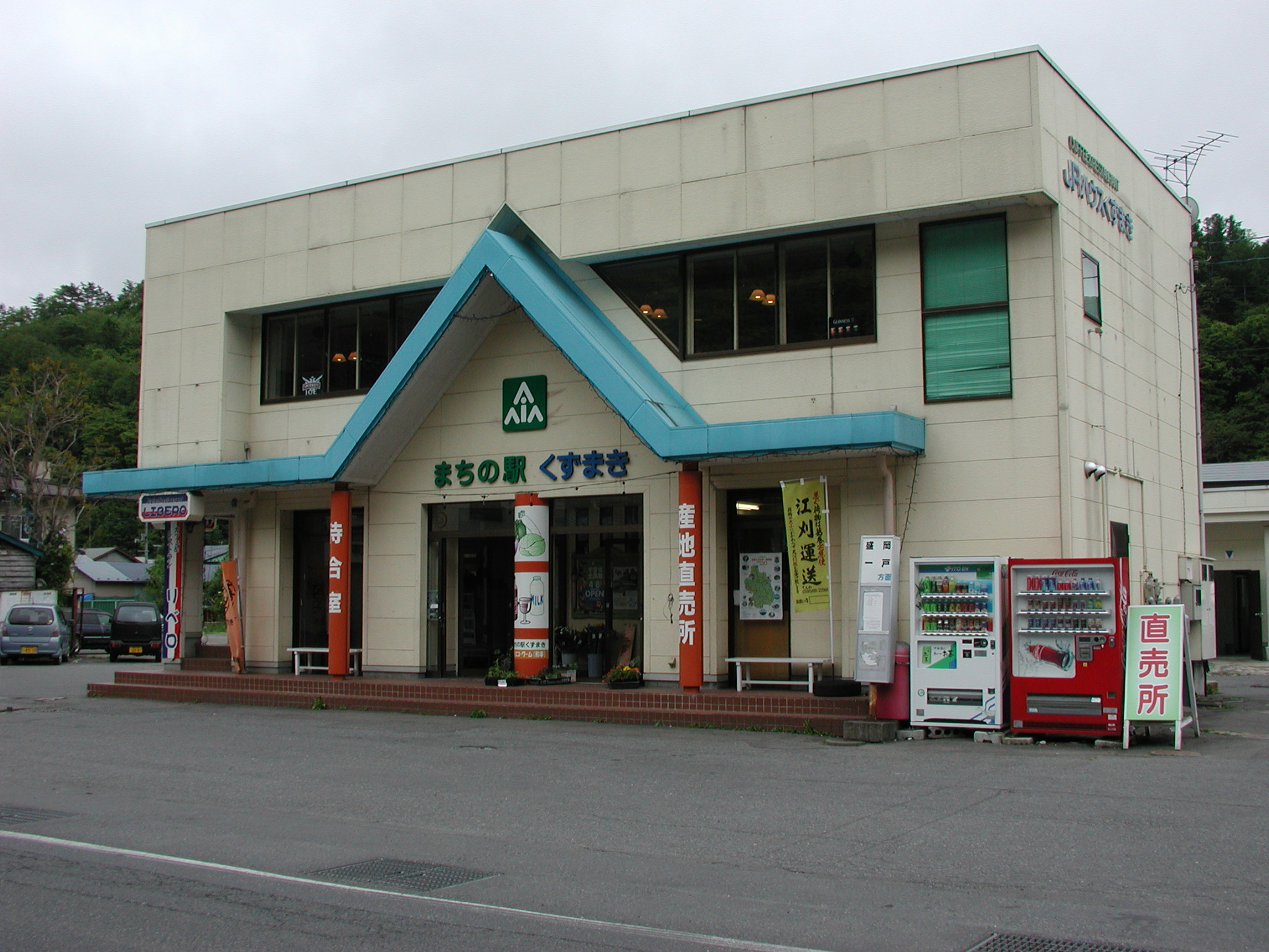 まちの駅 くずまき（ジェイアールバス東北葛巻駅併設）